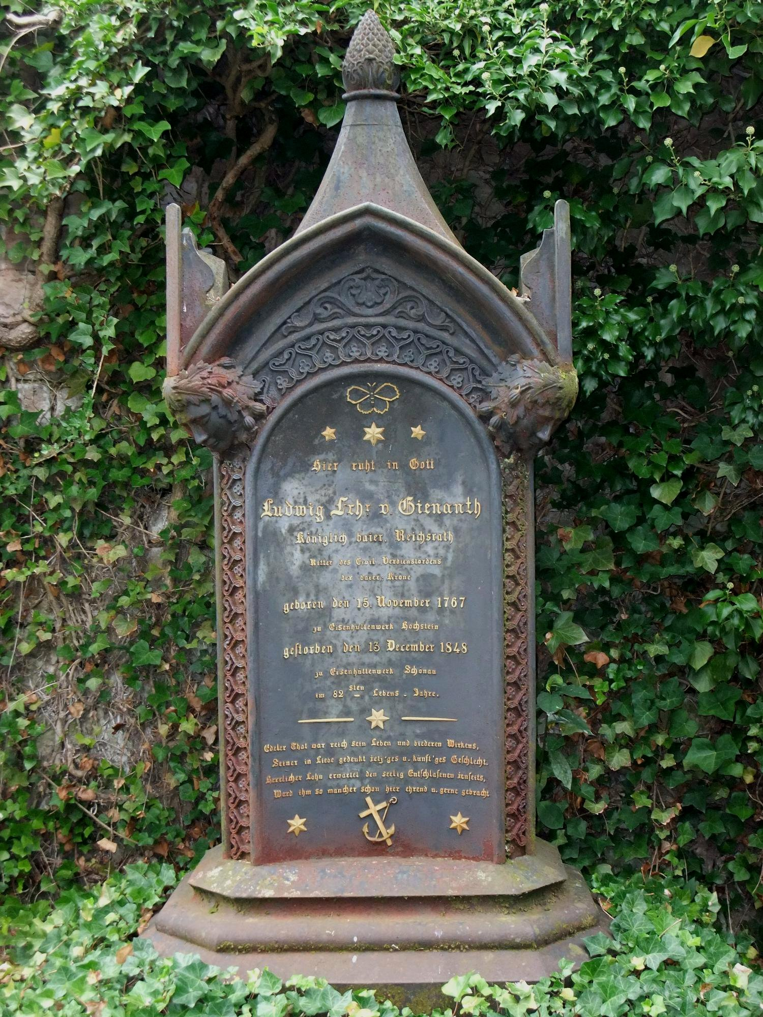 Grabmal für Ludwig von Gienanth (1767 - 1848) auf dem Friedhof in Hochstein (Winnweiler)